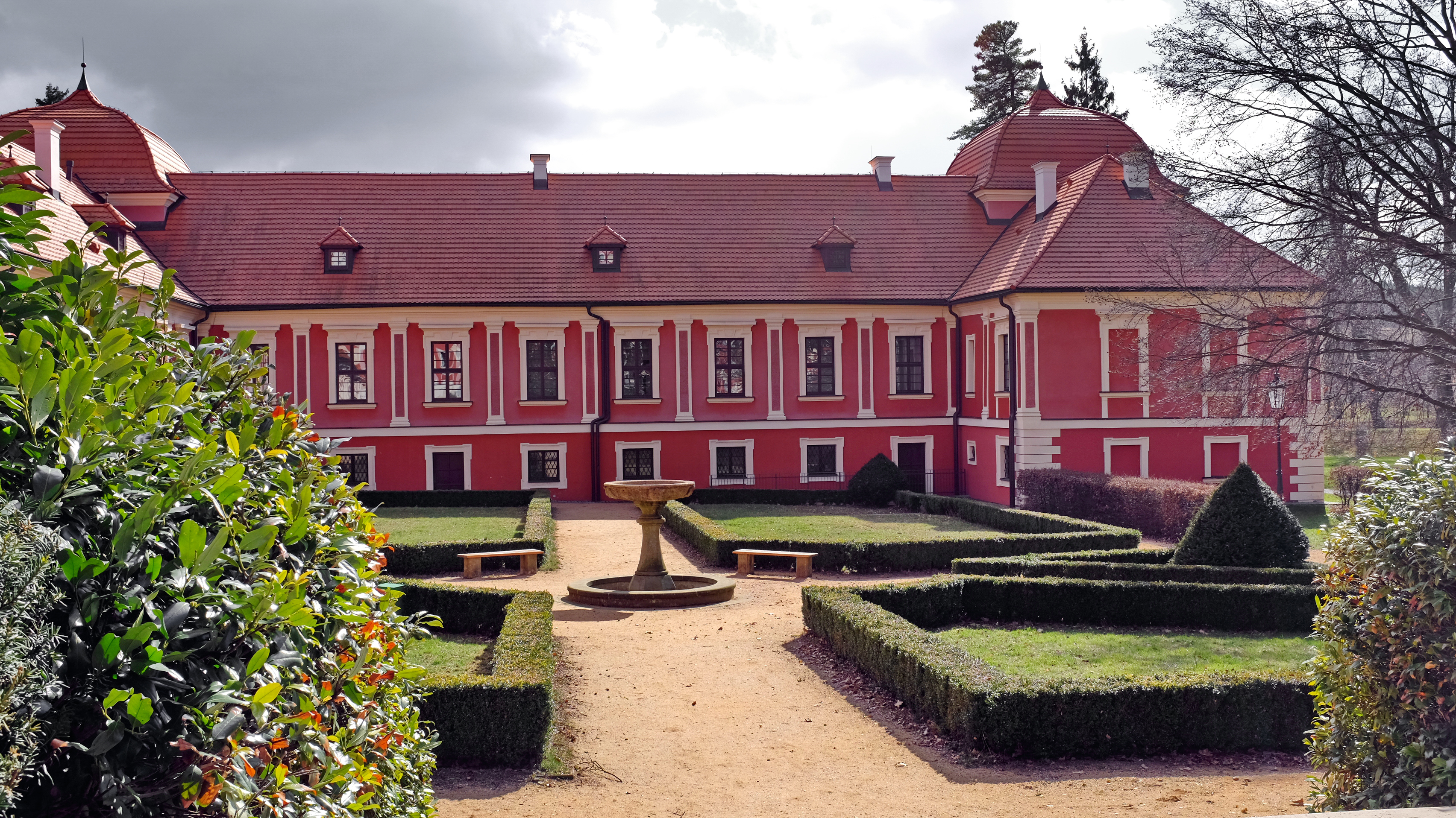 Zámek Ostrov, Jáchymovská 1, Ostrov (okres Karlovy Vary).